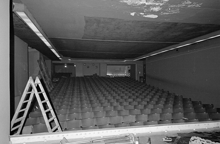 Biografen Smultronstället, f.d. Lejonungen. Interiör av biografsalongen. Folkungagatan 60